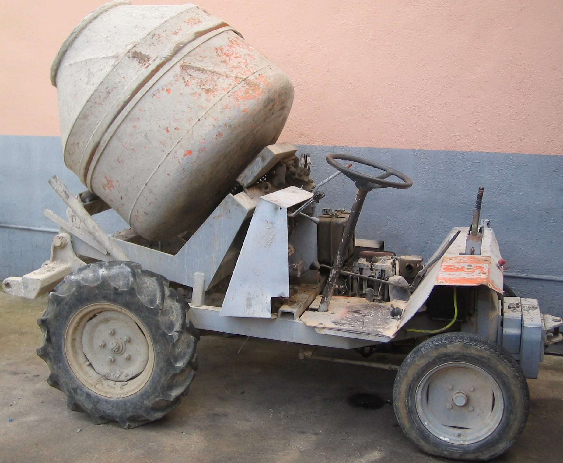 A cementer